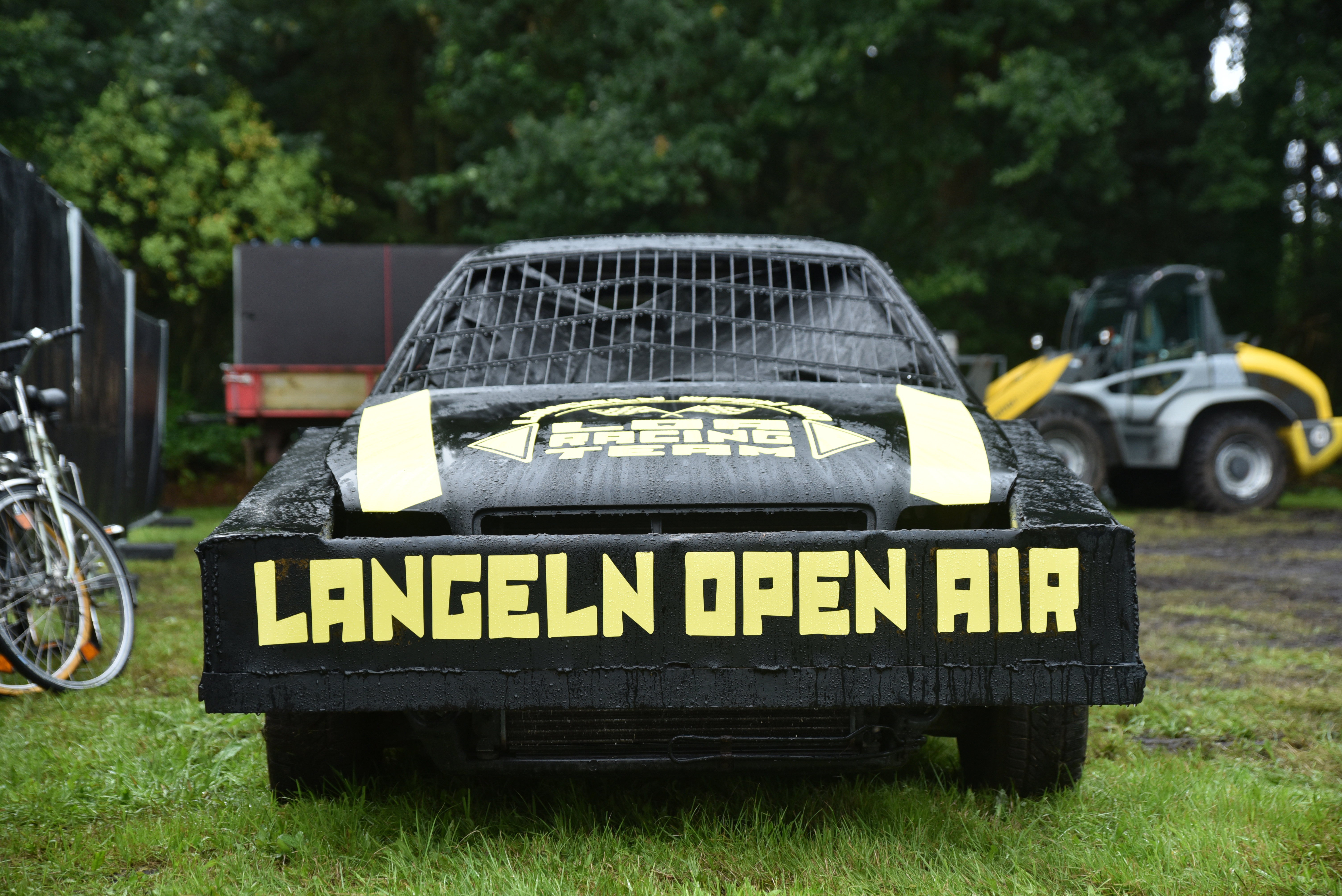 Stock Car beim Langeln Open Air 2016